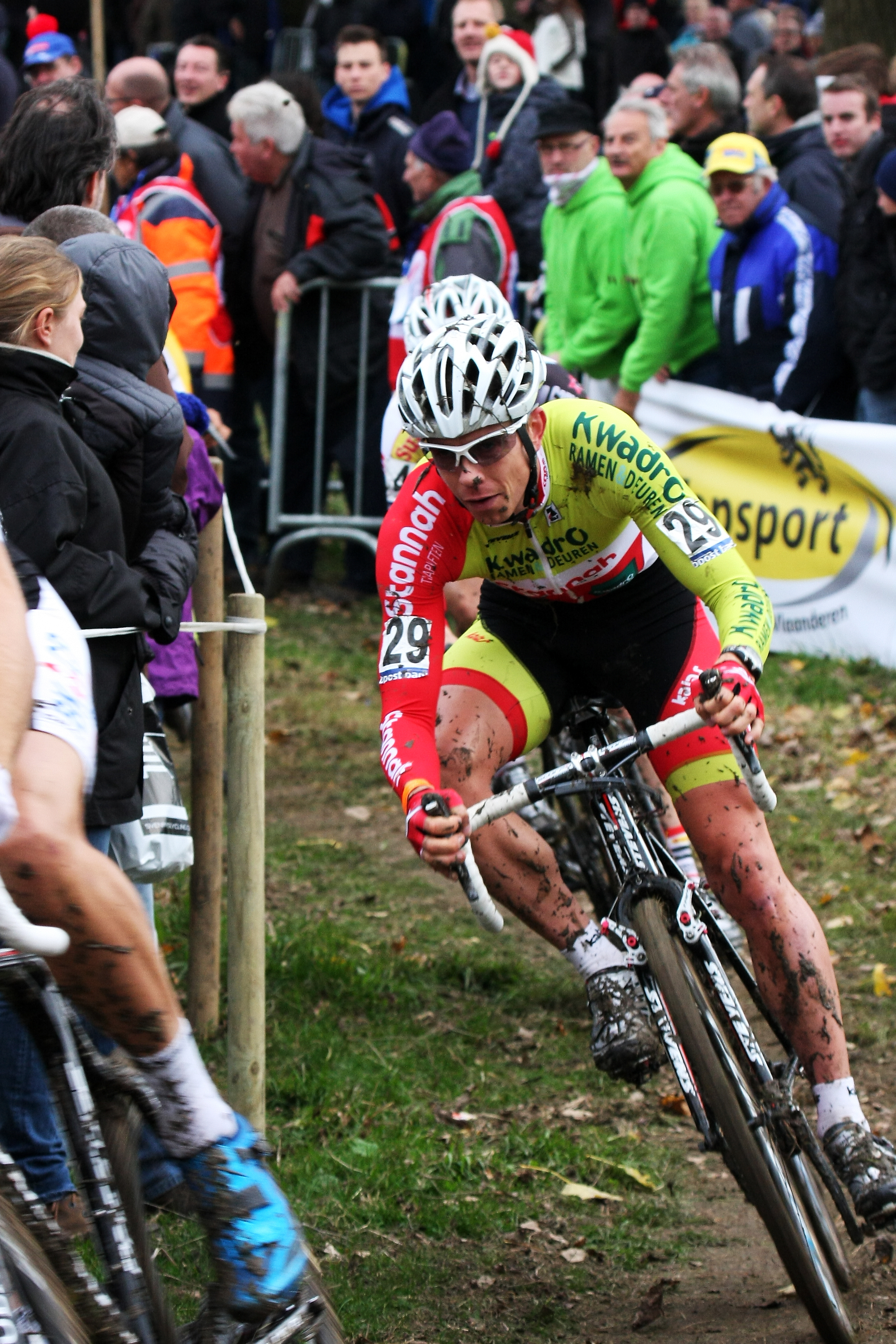 Mariusz Gil tijdens Koppenbergcross 2013.